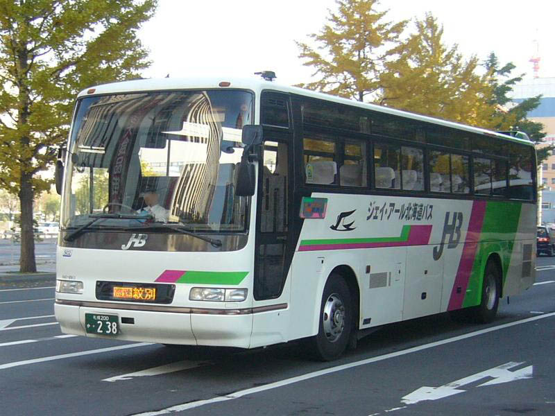 登録番号 札幌200か・238 ジェイアール北海道バス(JR Hokkaido bus)所属 高速流氷もんべつ(Higway bus Drift ice Monbetsu)号用 日野・セレガ KC-RU3FSCB